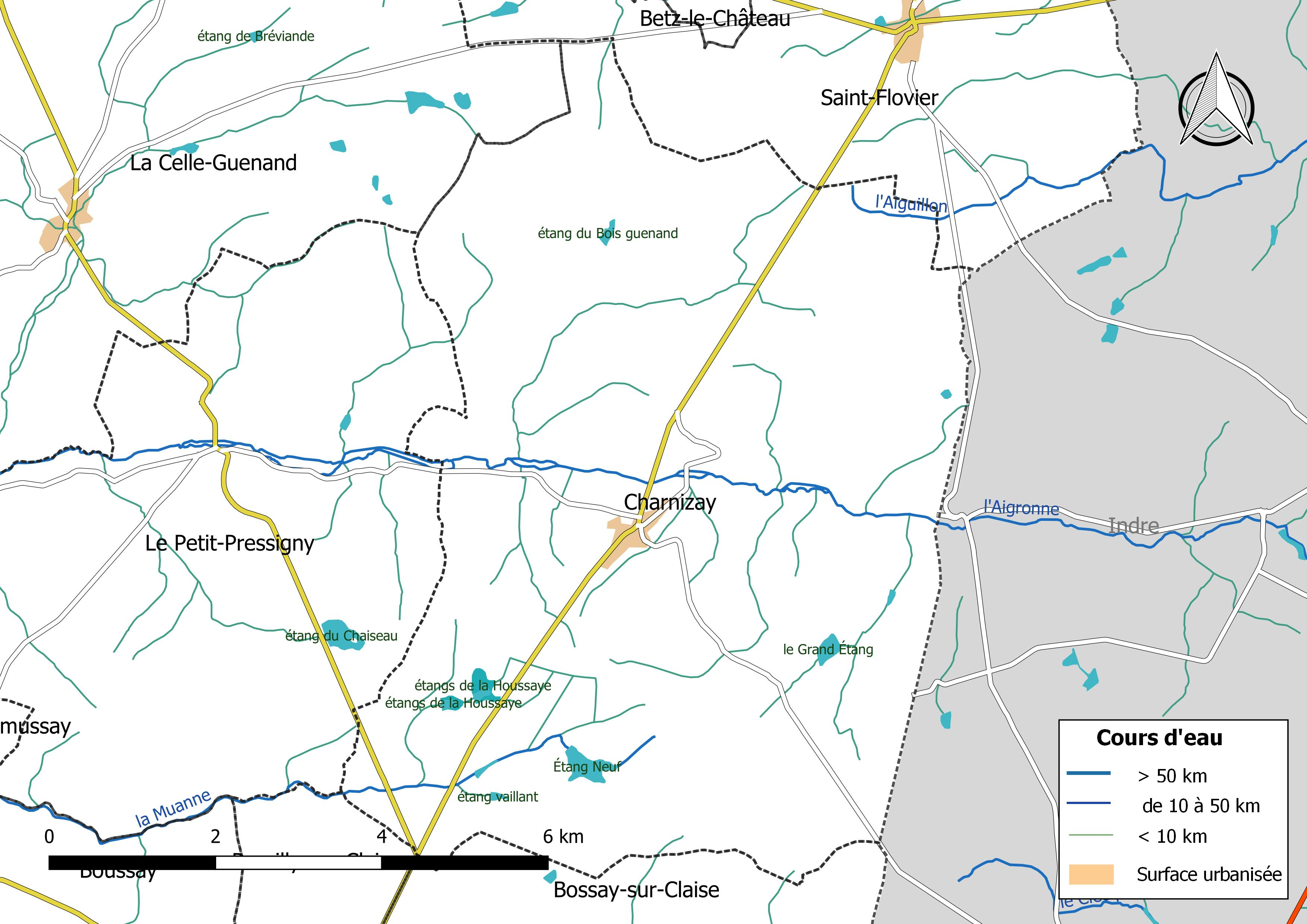 Carte du réseau hydrographique de la commune de Charnizay (France).